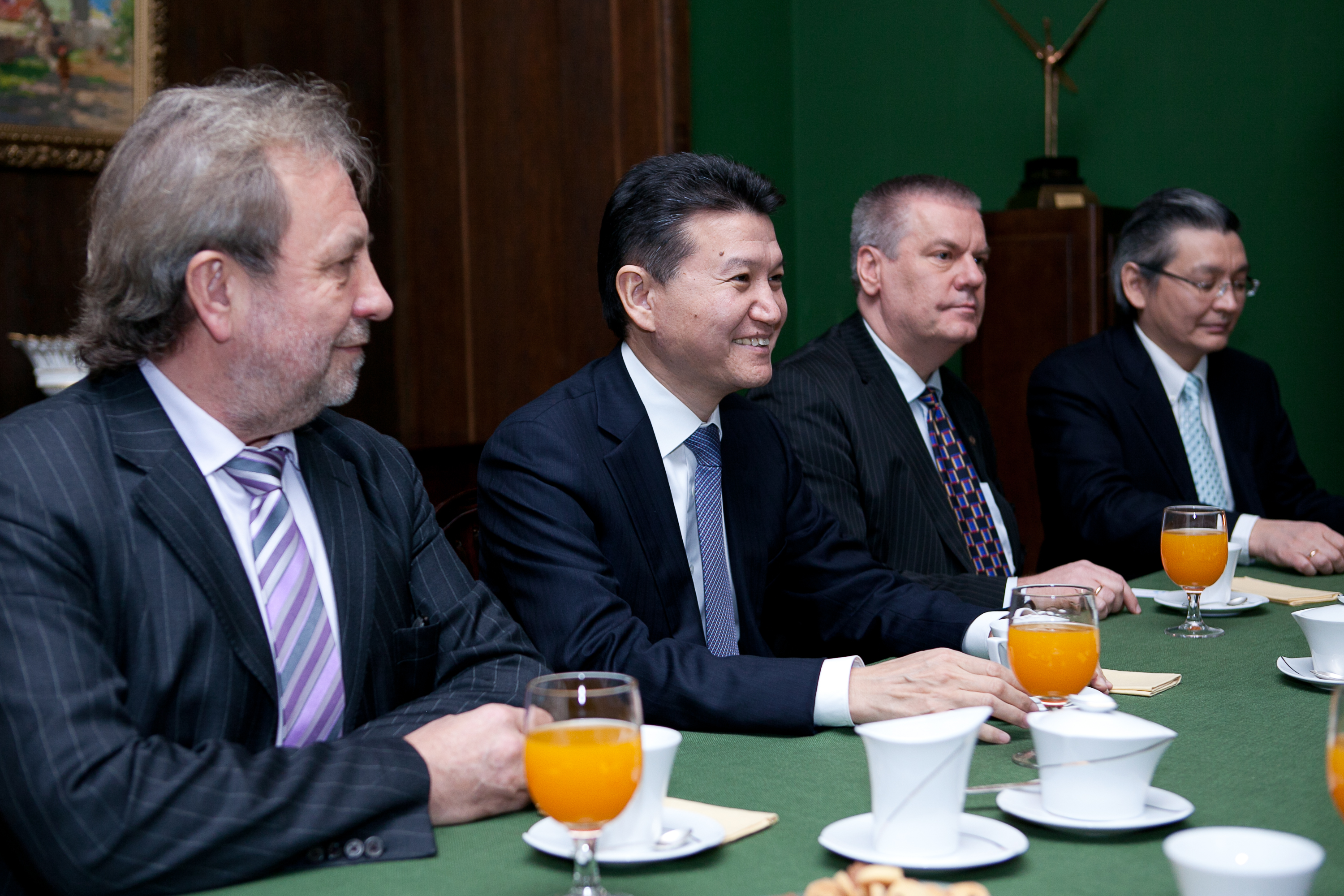 2011.gada 5.decembris. Saeimas Izglītības, kultūras un zinātnes komisijas Sporta apakškomisijas priekšsēdētājs Ivans Klementjevs tiekas ar Starptautiskās Šaha federācijas prezidentu Kirsanu Iljumžinovu (Kirsan Ilyumzhinov). Foto: Ernests Dinka, Saeimas Kanceleja